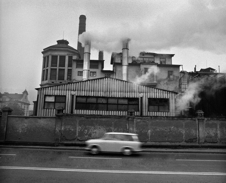 Trabant a mlékárna. (Radlická mlékárna na Smíchově ze Strakonické ulice.)